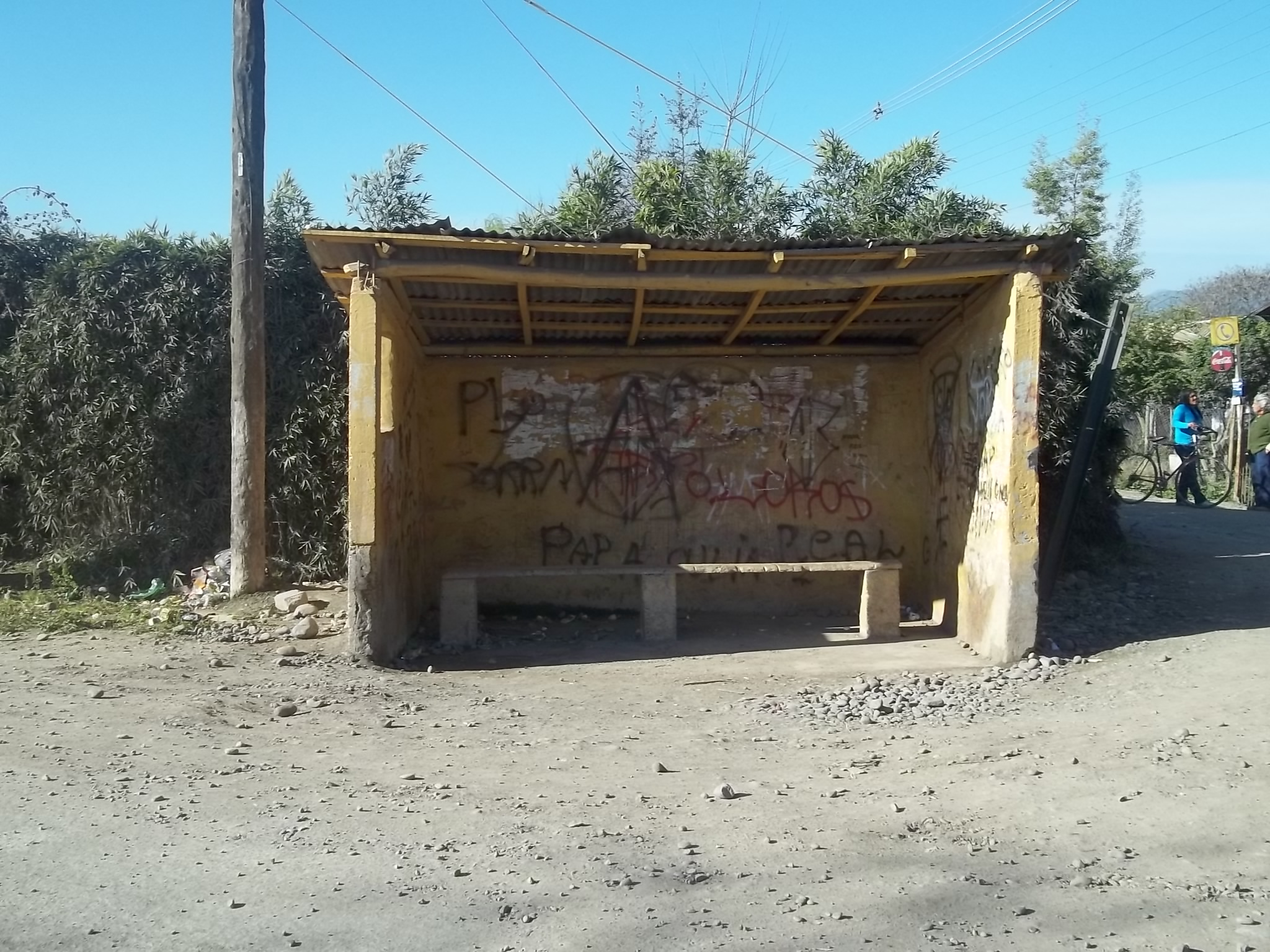 Garita, ubicada en la entrada de la poblacion Santa Victoria